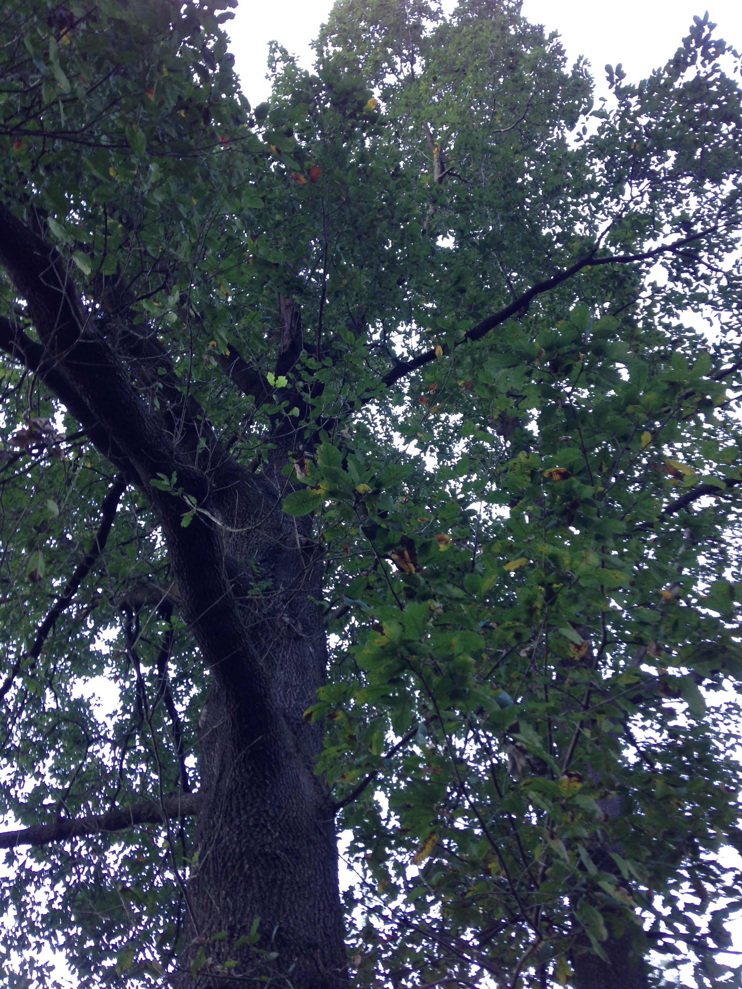 Quejigo Moruno o Roble andaluz (quercus canariensis) de la fuente de los perros) en Ceuta (Garcia Aldave), ejemplar singular autoctono This is a photography of a Special Area of Conservation in Spain with the ID: ES6310001. Natura2000 entry, EEA entry